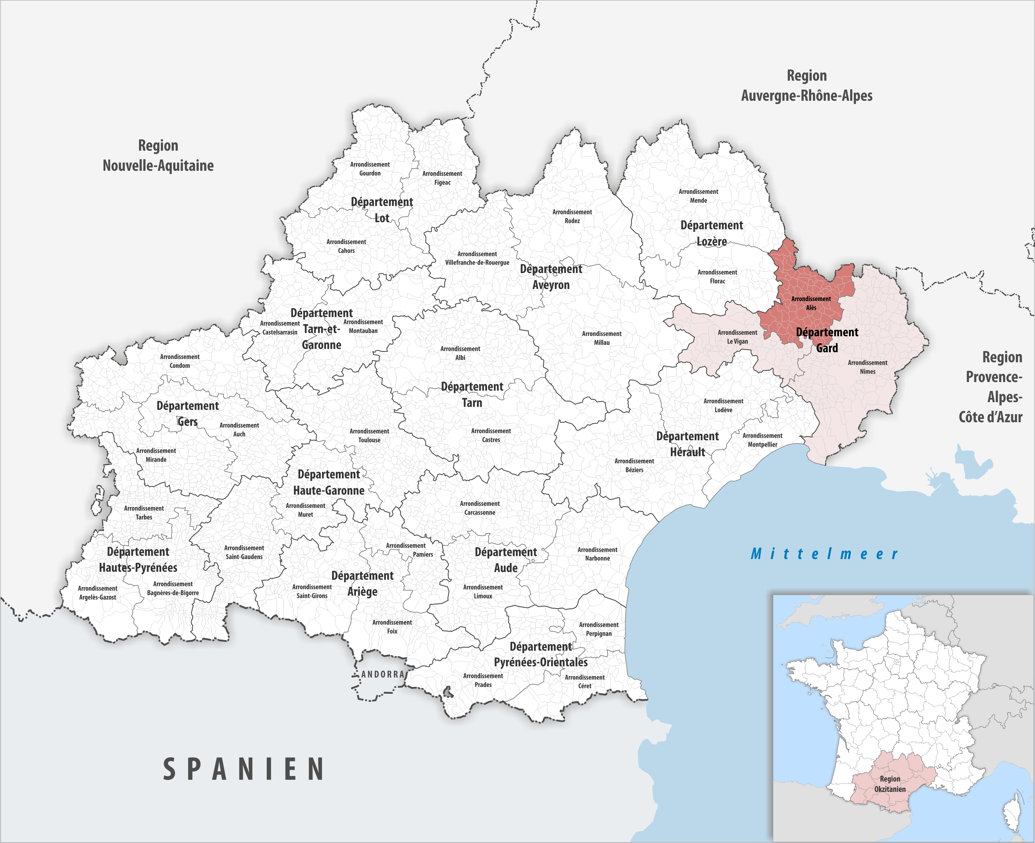 Lage des Arrondissements Alès